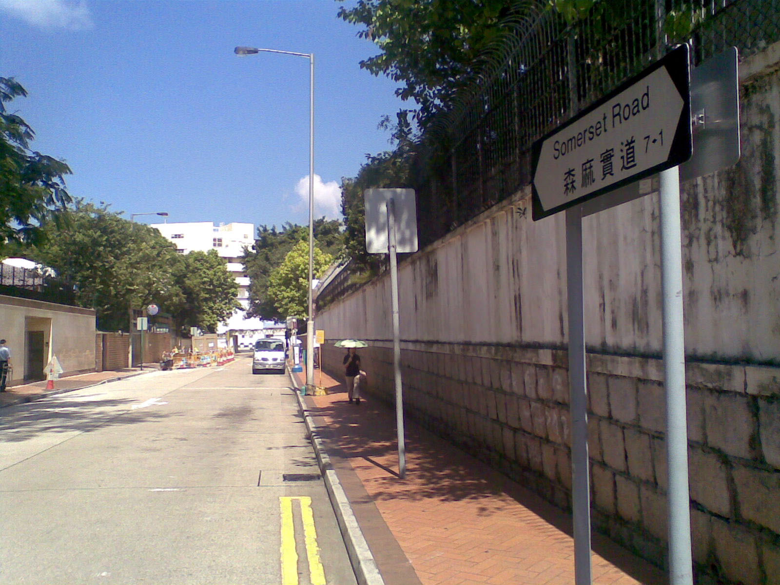 九龍塘森麻實道